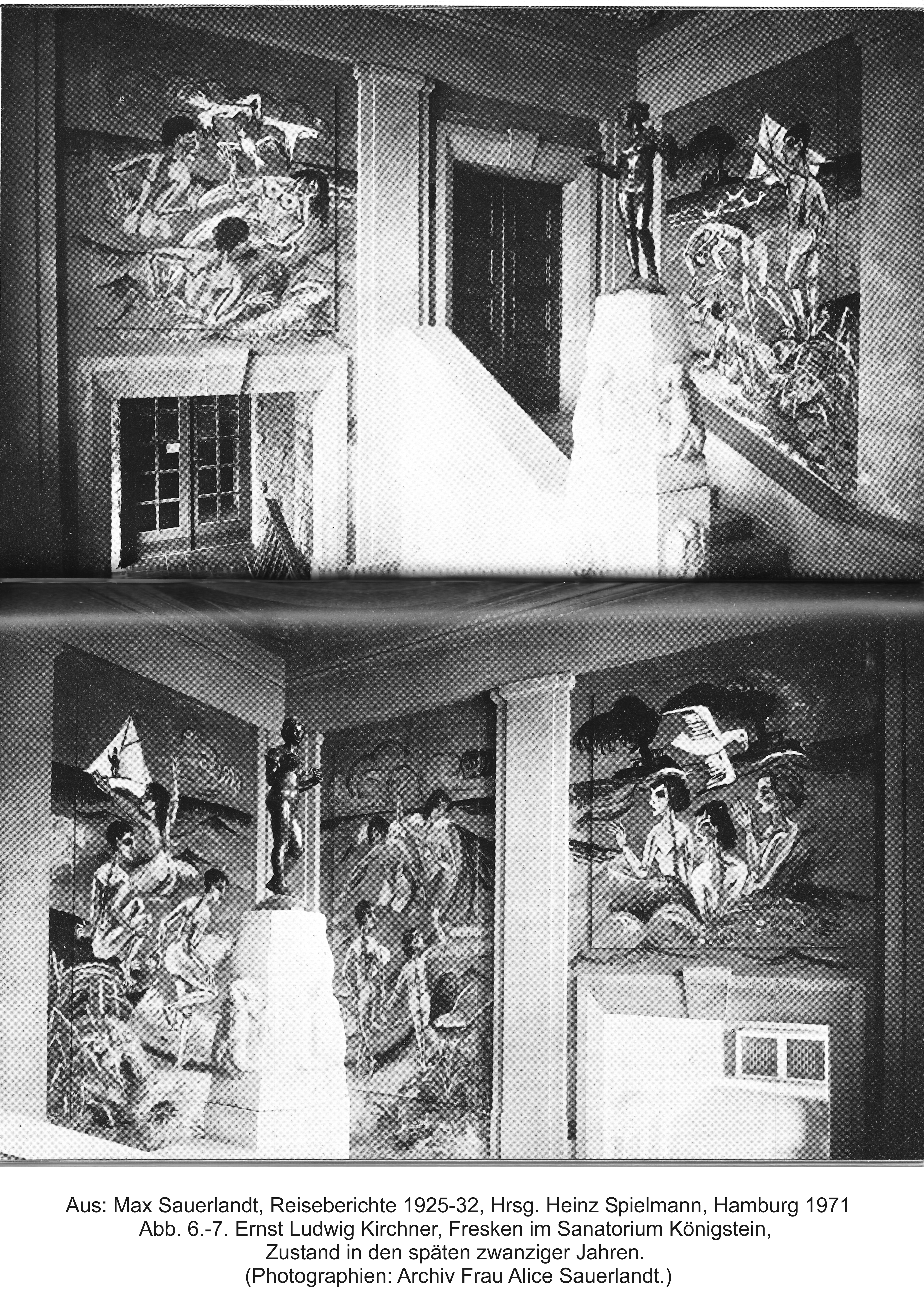 Die Wandbilder von Ernst Ludwig Kirchner im Sanatorium Dr. Kohnstamm, geschaffen 1916 Abbildung der Wandbilder, die Ernst Ludwig Kirchner bei seinem Aufenthalt im Sommer 1916 im Sanatorium Dr. Kohnstamm im enkaustischen Verfahren geschaffen hatte. Sie werden üblicherweise mit dem Titel "Badeszenen aus Fehmarn" bezeichnet. Max Sauerlandt ist 1934 verstorben. Siehe auch :OTRS:2010010810016761 Reinhard Kraasch 02:30, 9. Jan. 2010 (CET)